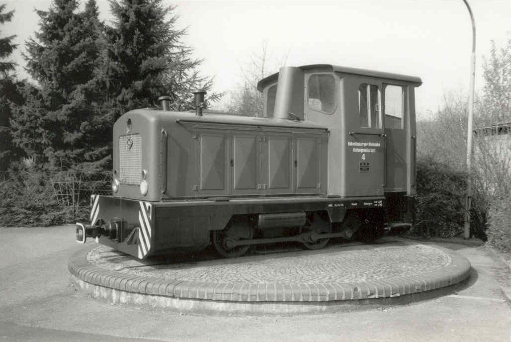 Die Lokomotive Nr. 4 der Hohenlimburger Kleinbahn, als Denkmal aufgestellt in Hohenlimburg (Ludwigstraße, Unternahmer, bei C.D. Wälzholz)